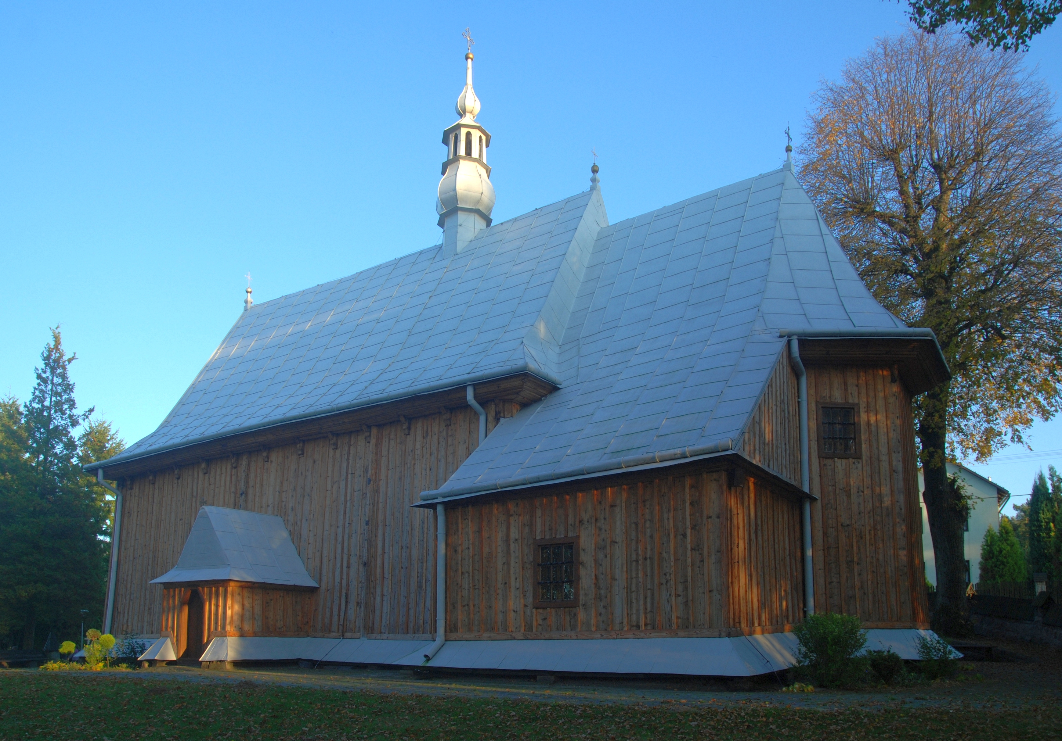 wieś Rożnów (województwo małopolskie)